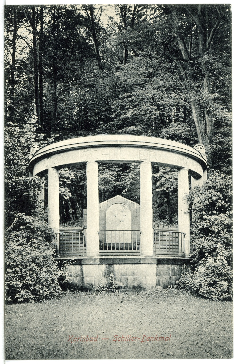 Karlsbad; Schillerdenkmal This postcard is from publisher Brück & Sohn in Meißen ( This postcard has a unique number 15413 and is available in a higher resolution at the publisher. This images was uploaded in a cooperation project between Wikipedians and the publisher.